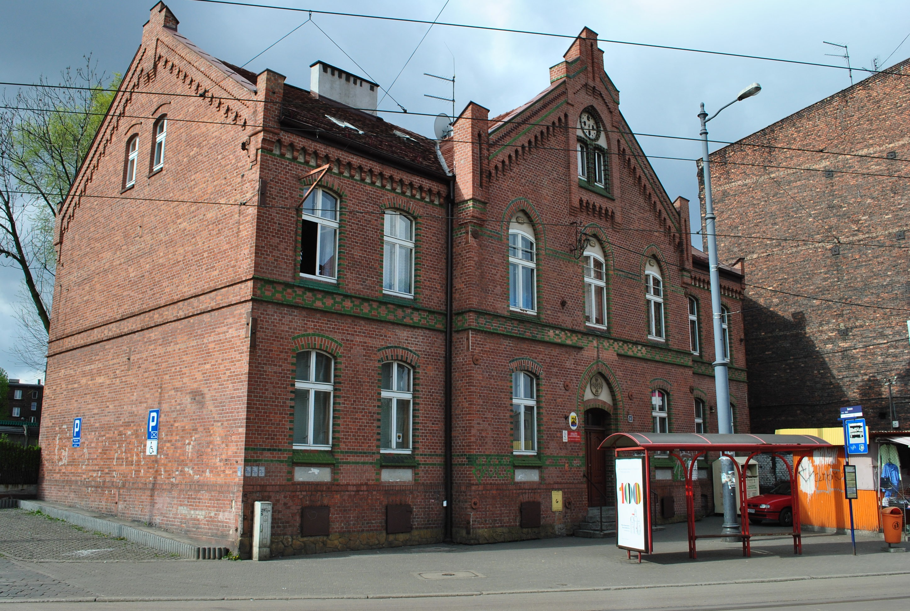 Katowice - Załęże. Dawny urząd gminy przy ul. Gliwickiej 102; dwupiętrowa, ze szczytem, zwieńczonym zegarem; budynek pochodzi z 1897 r.